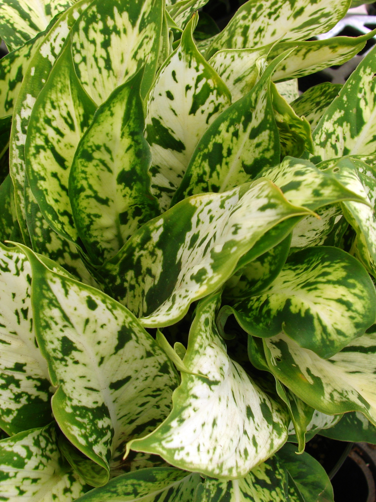 Dieffenbachia maculata